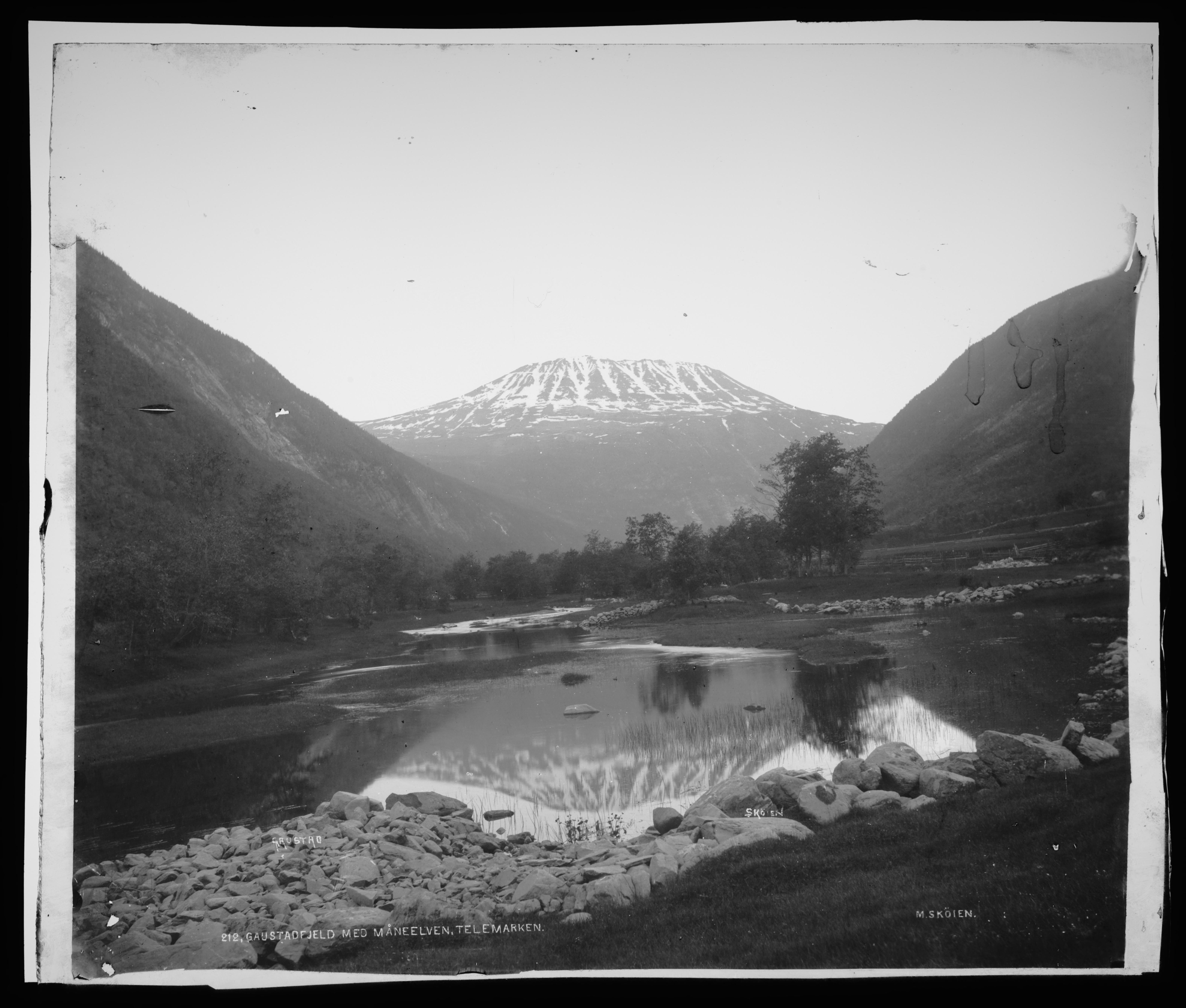 Skøiens katalog: Gaustafjeld, afspeilendes i Maaneelven. Påskrift negativ: 212, Gaustadfjeld med Måneelven, Telemarken. M.Skøien Påskrift konvolutt: Gaustadtoppen [Riksantikvaren] Positiv plate. Sted: Gaustatoppen,Måna Kommune: Tinn Fylke: Telemark Tagger: repro: landskap fjell elv